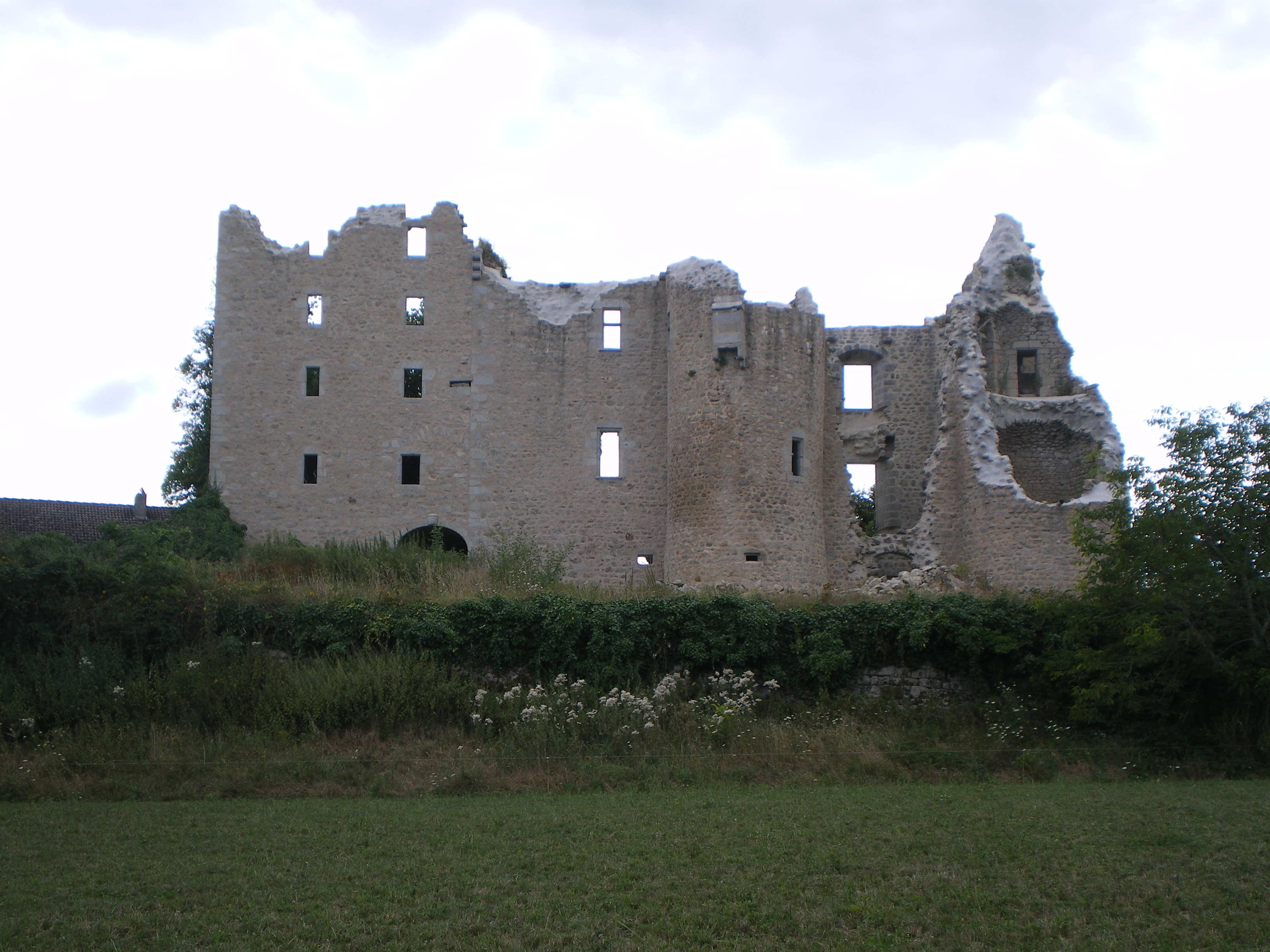 Château de Naucaze, Saint-Julien-de-Toursac, Cantal, France